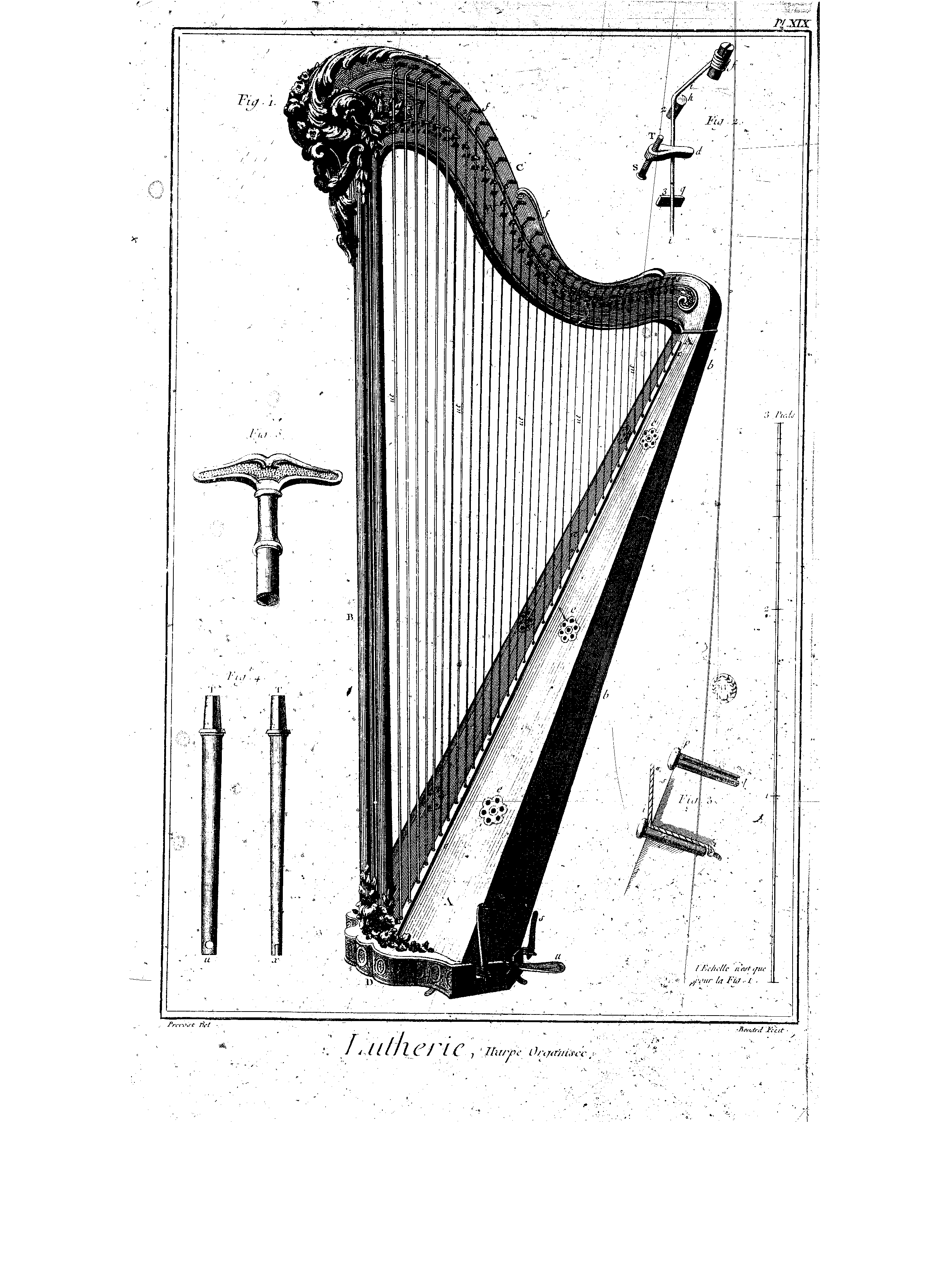 Planches de l'Encyclopédie de Diderot et d'Alembert, volume 4